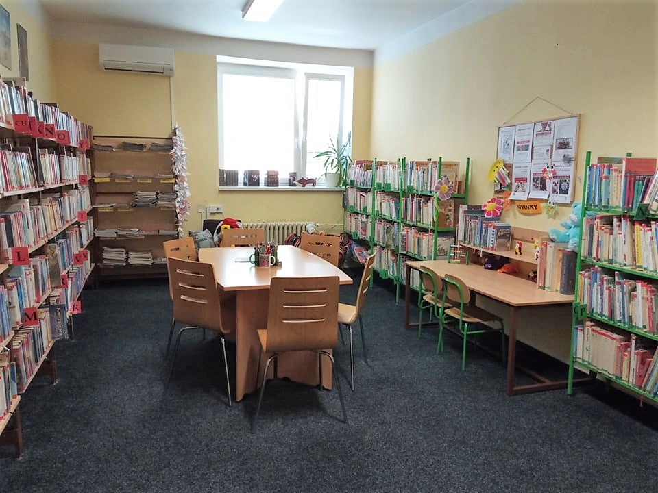 Dětské oddělení knihovny